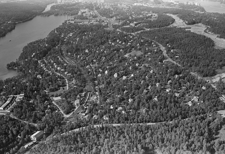 Storängen flygfoto vy mot väst med Järlasjön t.v.